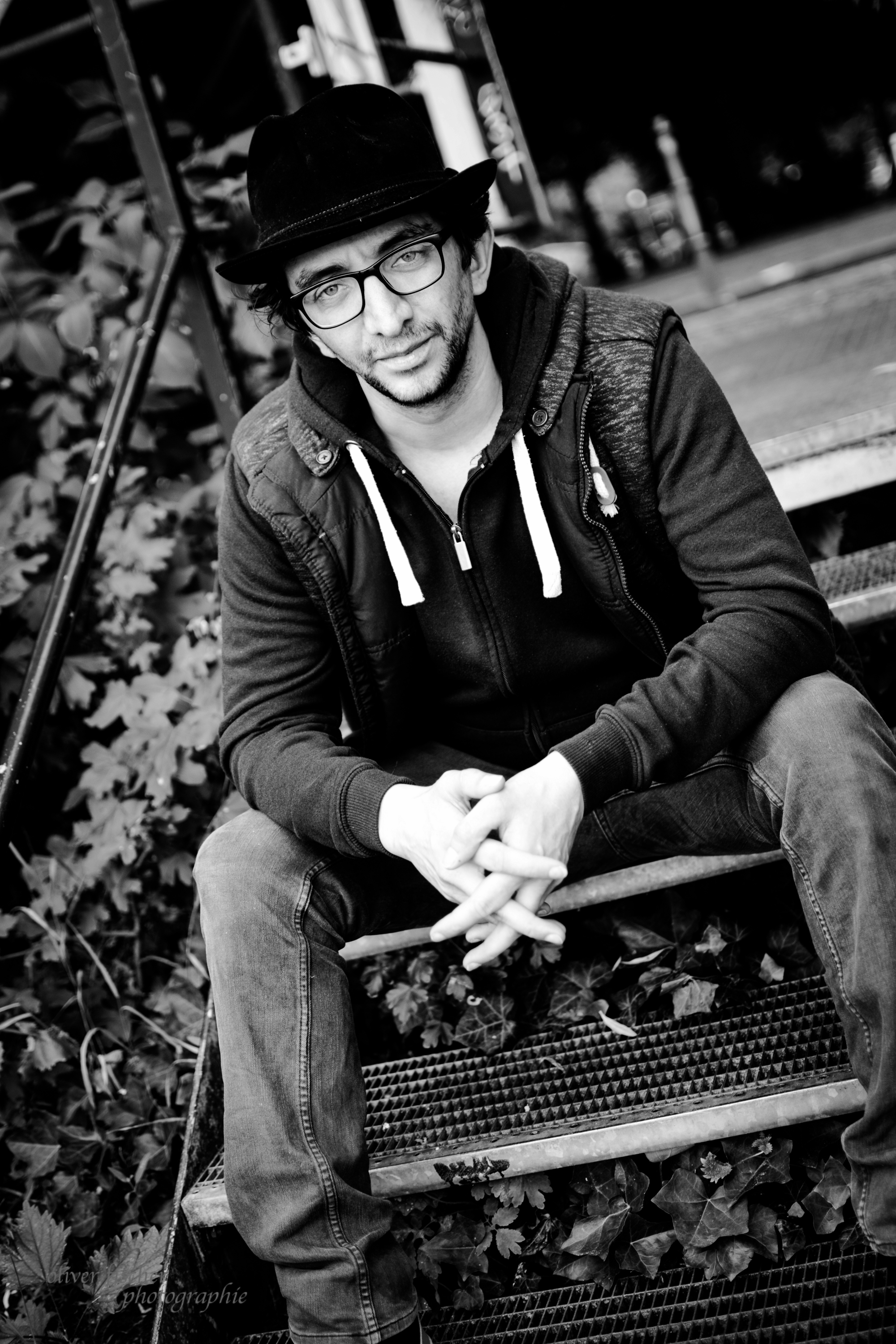 Stephan Jurichs 2016 © Oliver Fischer